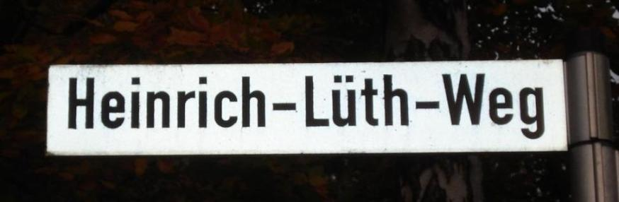 Das Straßenschild Heinrich-Lüth-Weg Eutin